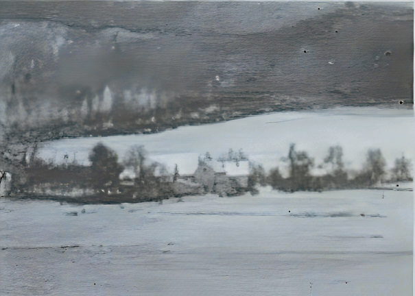 Historische Ansicht der Ortslage Schwenge bei Oberzella. Die Höfe wurden 1974 abgebrochen.